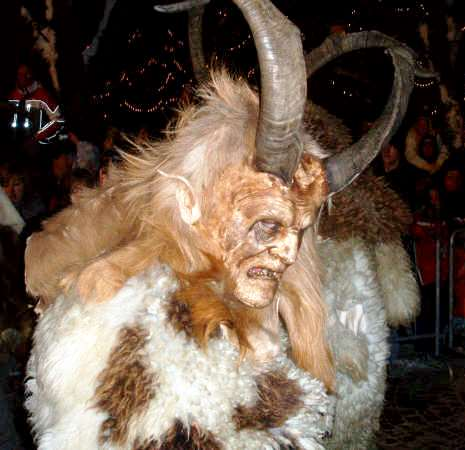 Krampus in Toblach